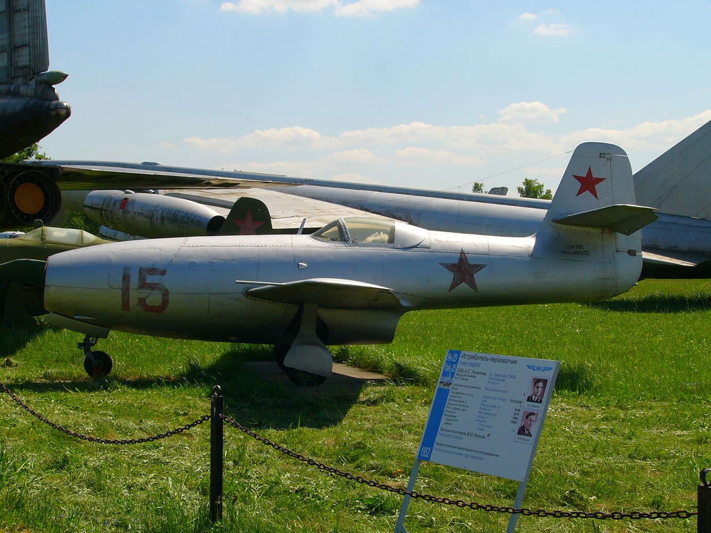 Як-23 в Центральном музее Военно-воздушных сил РФ